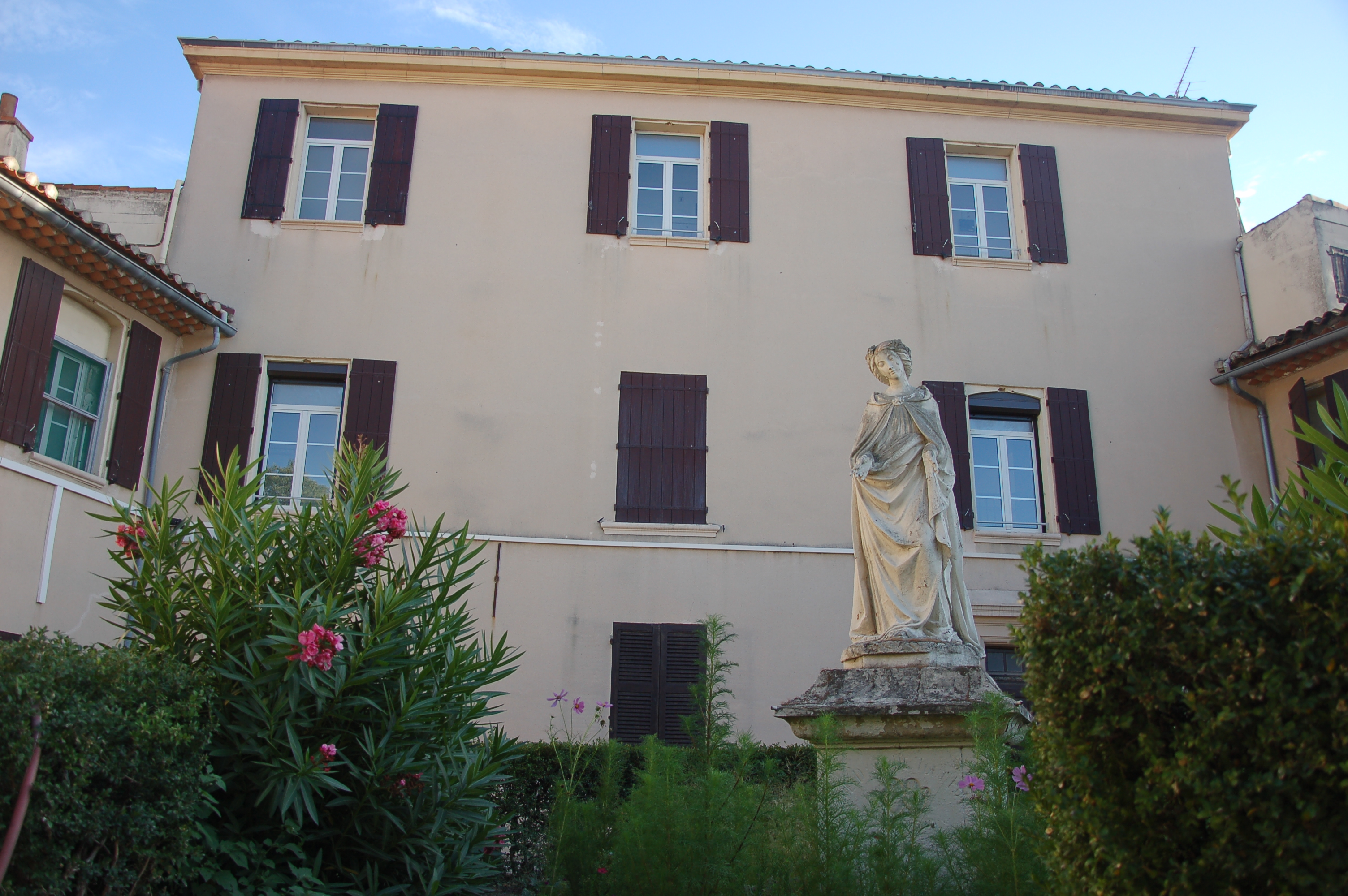 Les sœurs de Notre-Dame de la Compassion sont une congrégation religieuse catholique créée par le Père Barthès à Marseille au XIXème siècle.Leur maison mère se trouve dans le XIIème arrondissement de Marseille, dans l'Allée de la Compassion, autrefois le domaine de la famille Blancard.